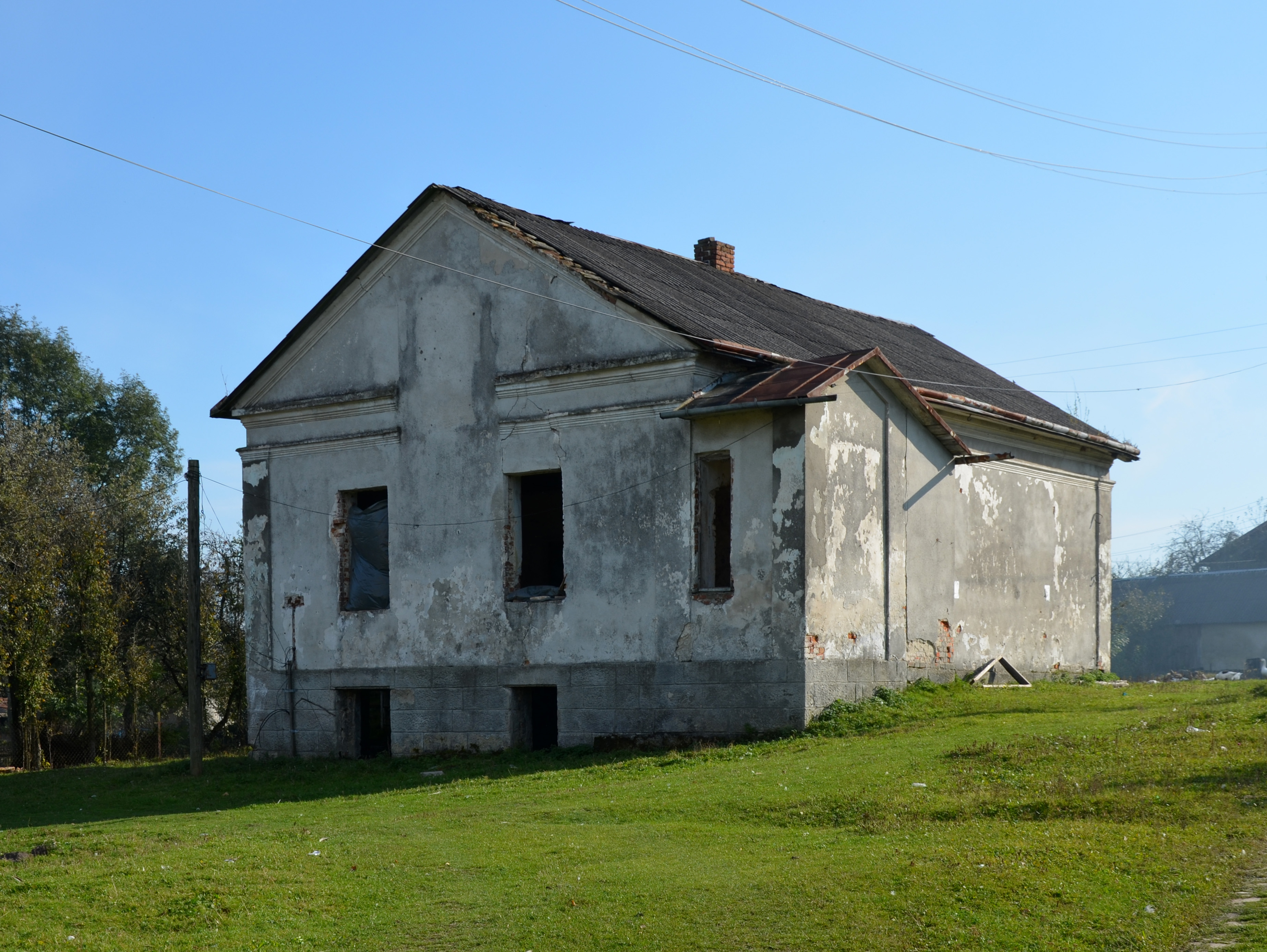 Клуб у селі Чуперносів Перемишлянського району Львівської області.